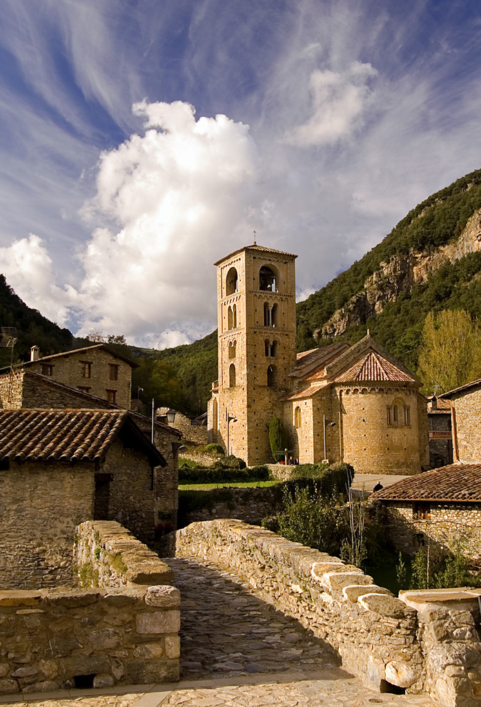 Església de Sant Cristòfol, a Beget (Alta Garrotxa, Catalunya)